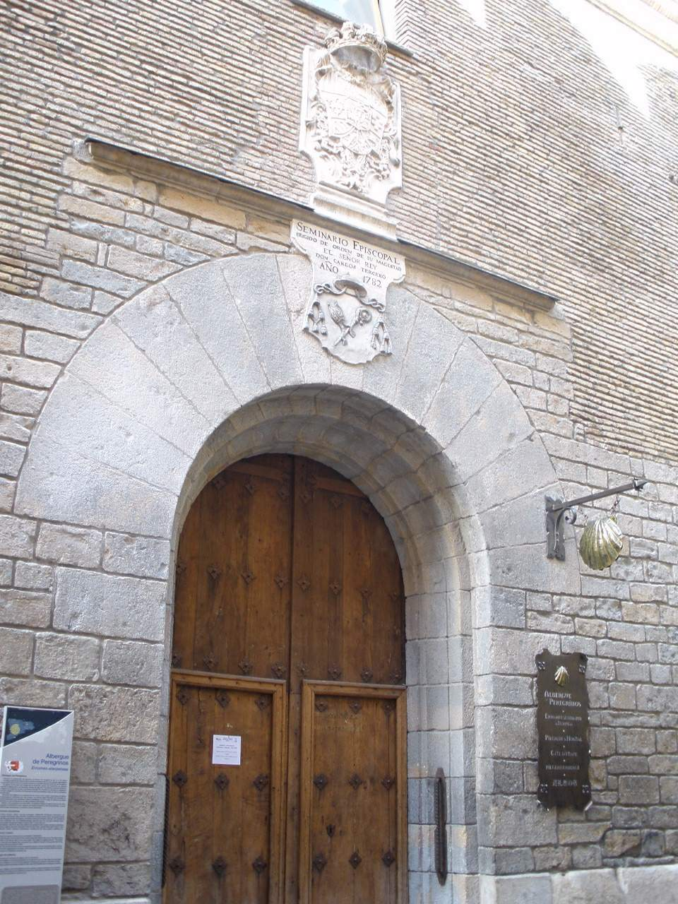 Albergue de Peregrinos de Pamplona